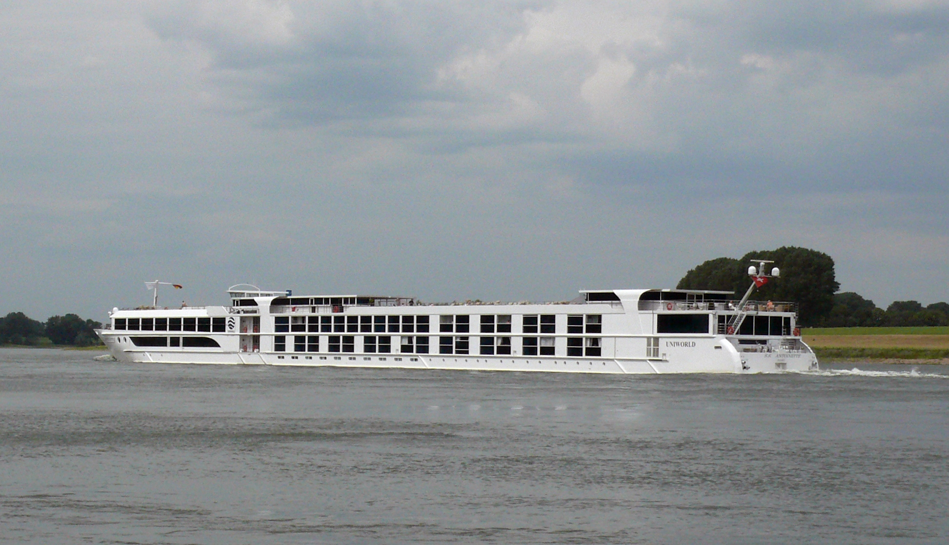 Flusskreuzfahrtschiff auf Fahrt auf dem Rhein